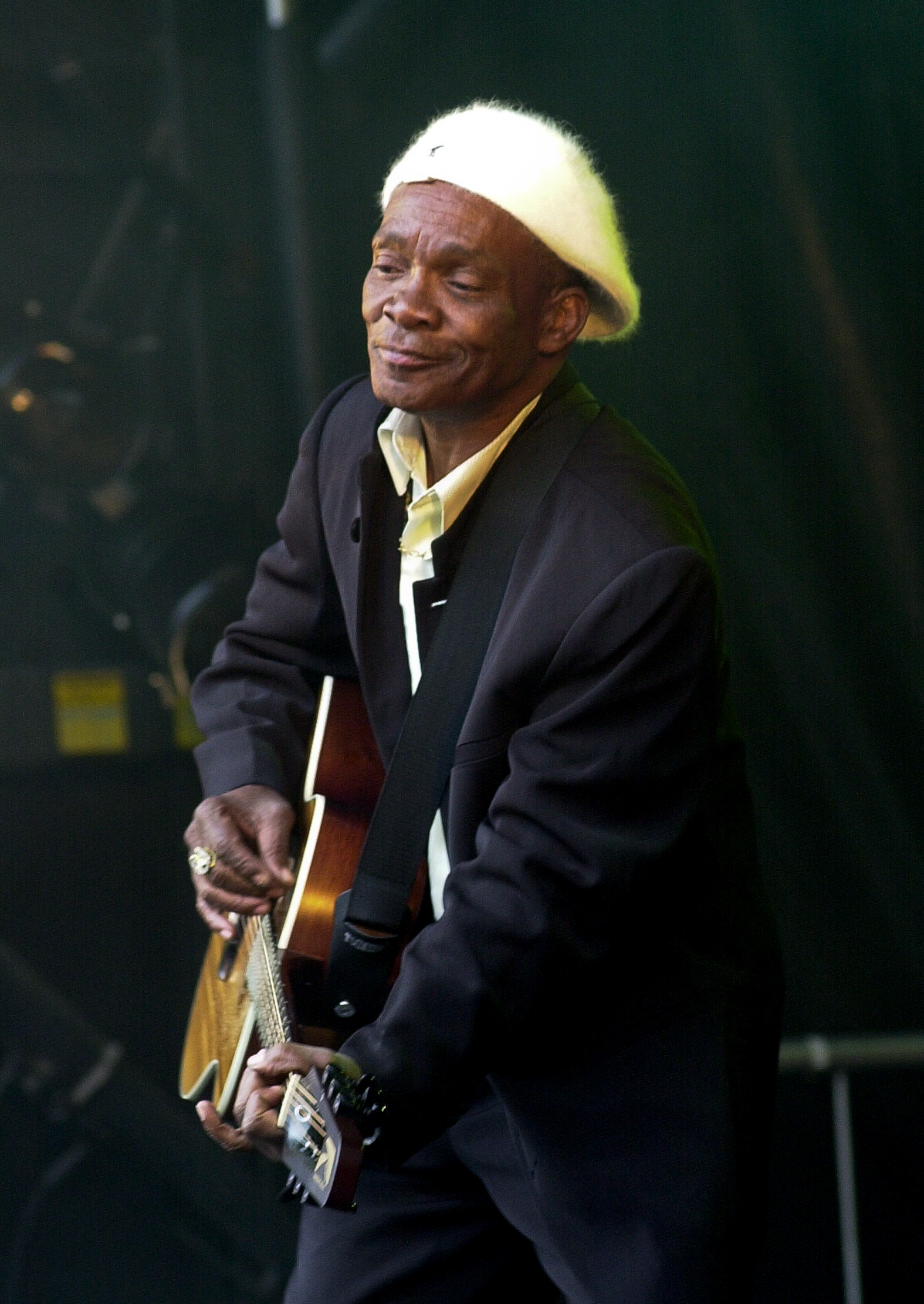 Stanley Beckford en concert gratuit à Lille France , en avril 2004